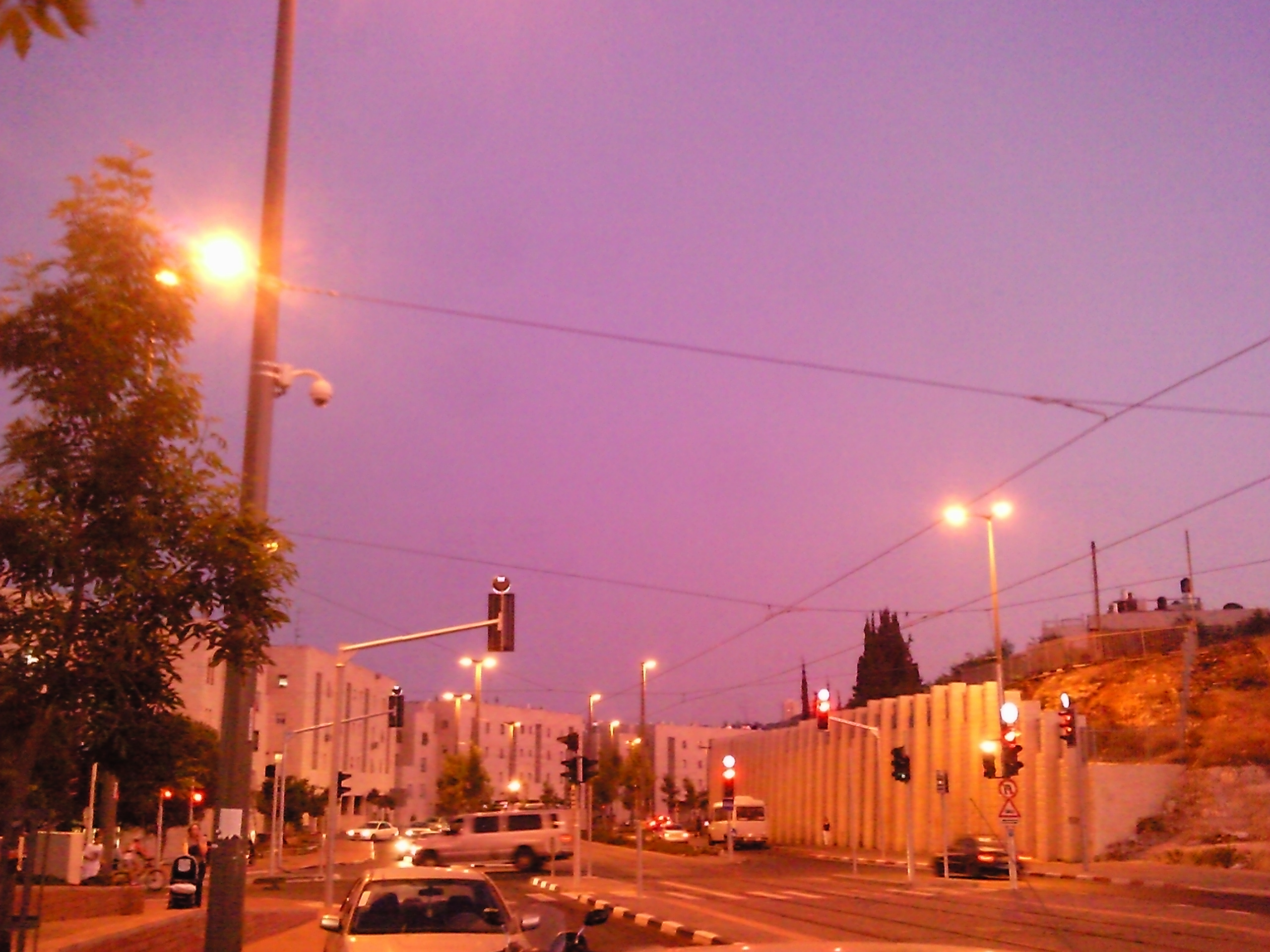 שדרות משה דיין אחד הרחובות הראשיים בפסגת זאב.